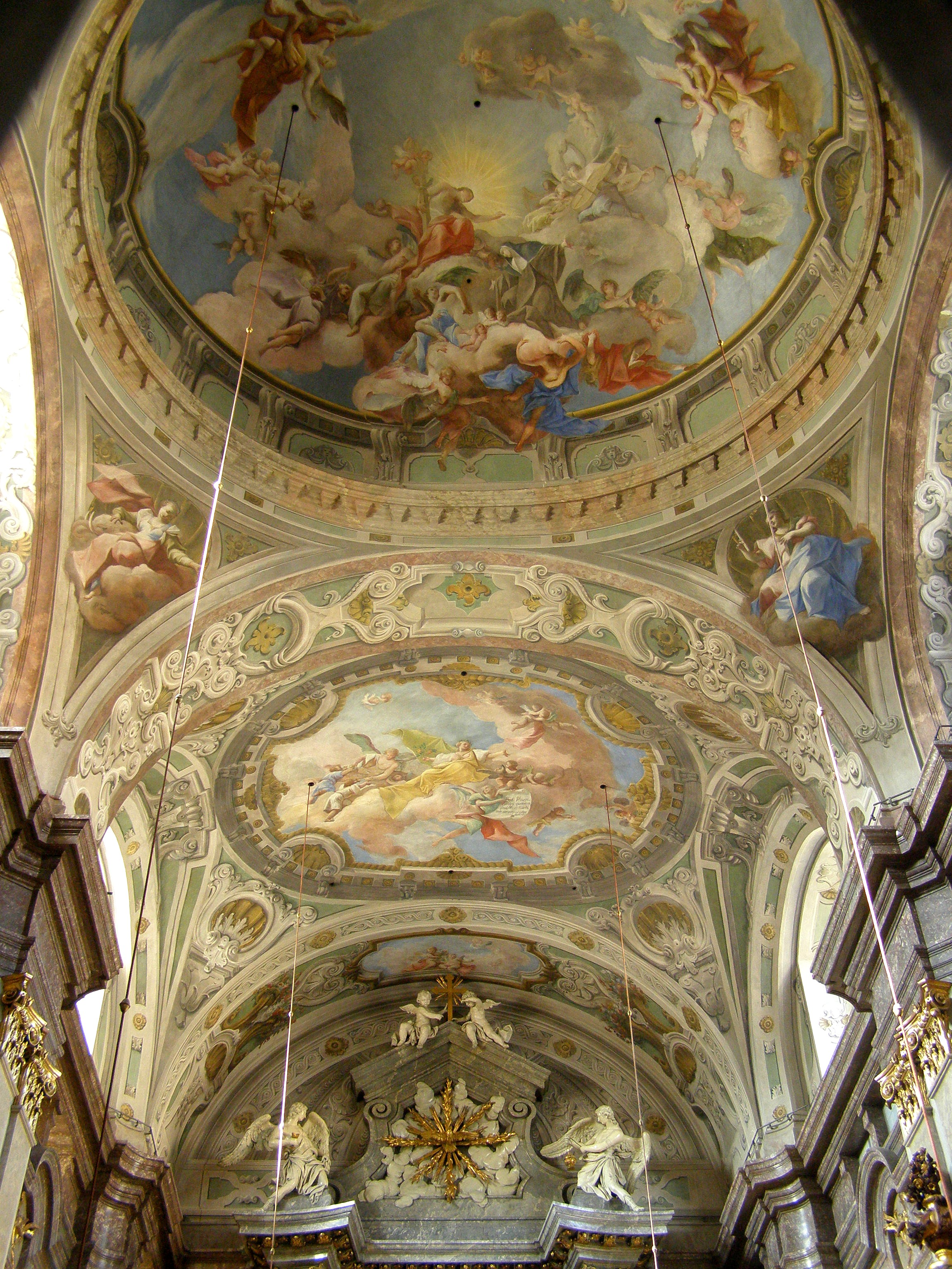 Klenbová fresková výmaľba kostola s ústrednou freskou Glorifikáca svätej Alžbety (1742 - 1743) od Paula Trogera